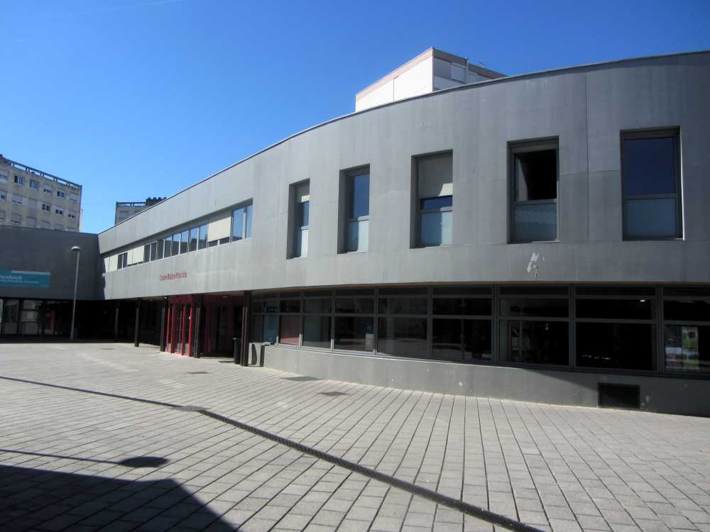 Médiathèque à Besançon (France)